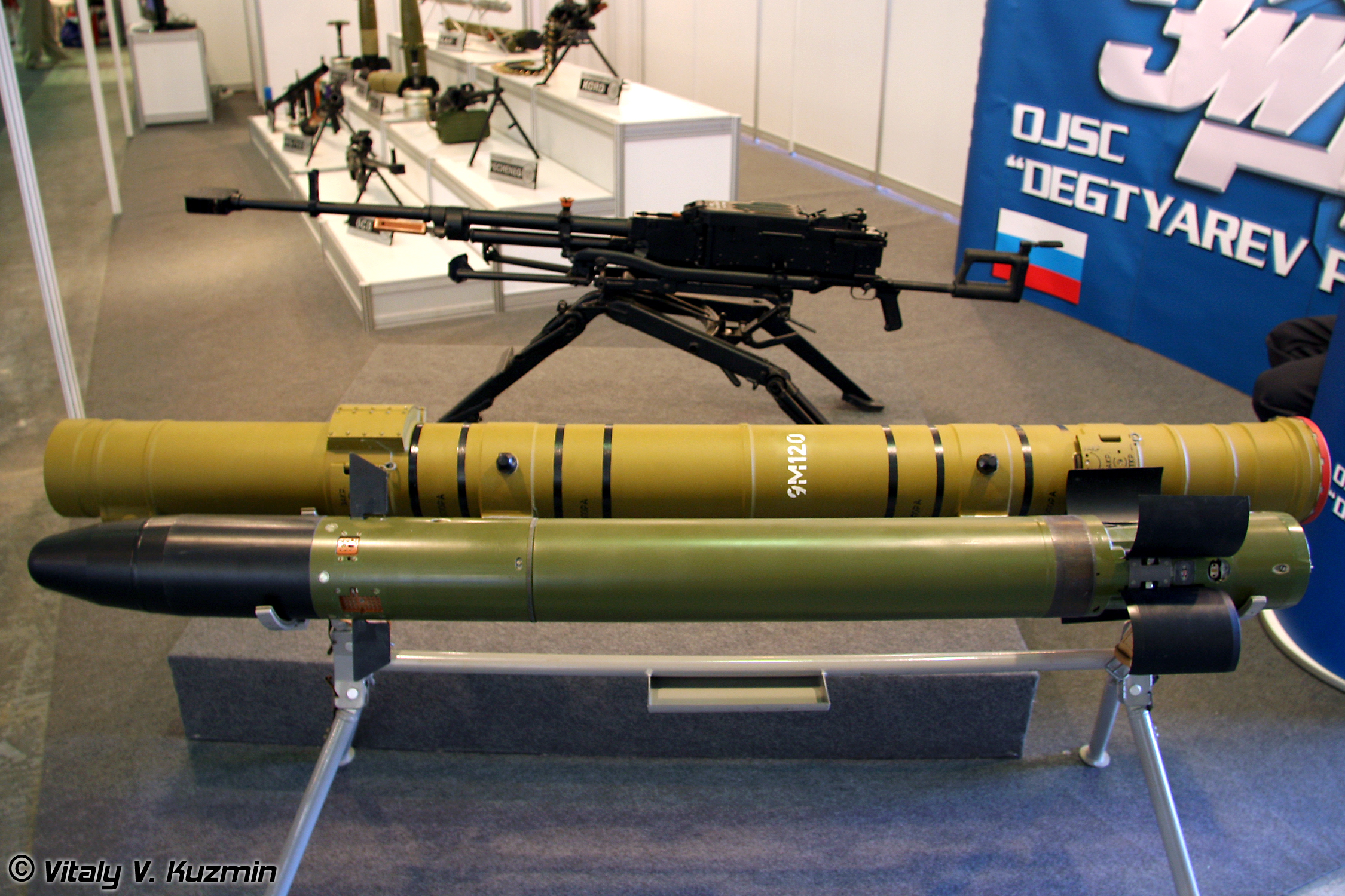 Противотанковая управляемая ракета 9М120 (9M120 antitank guided missile)